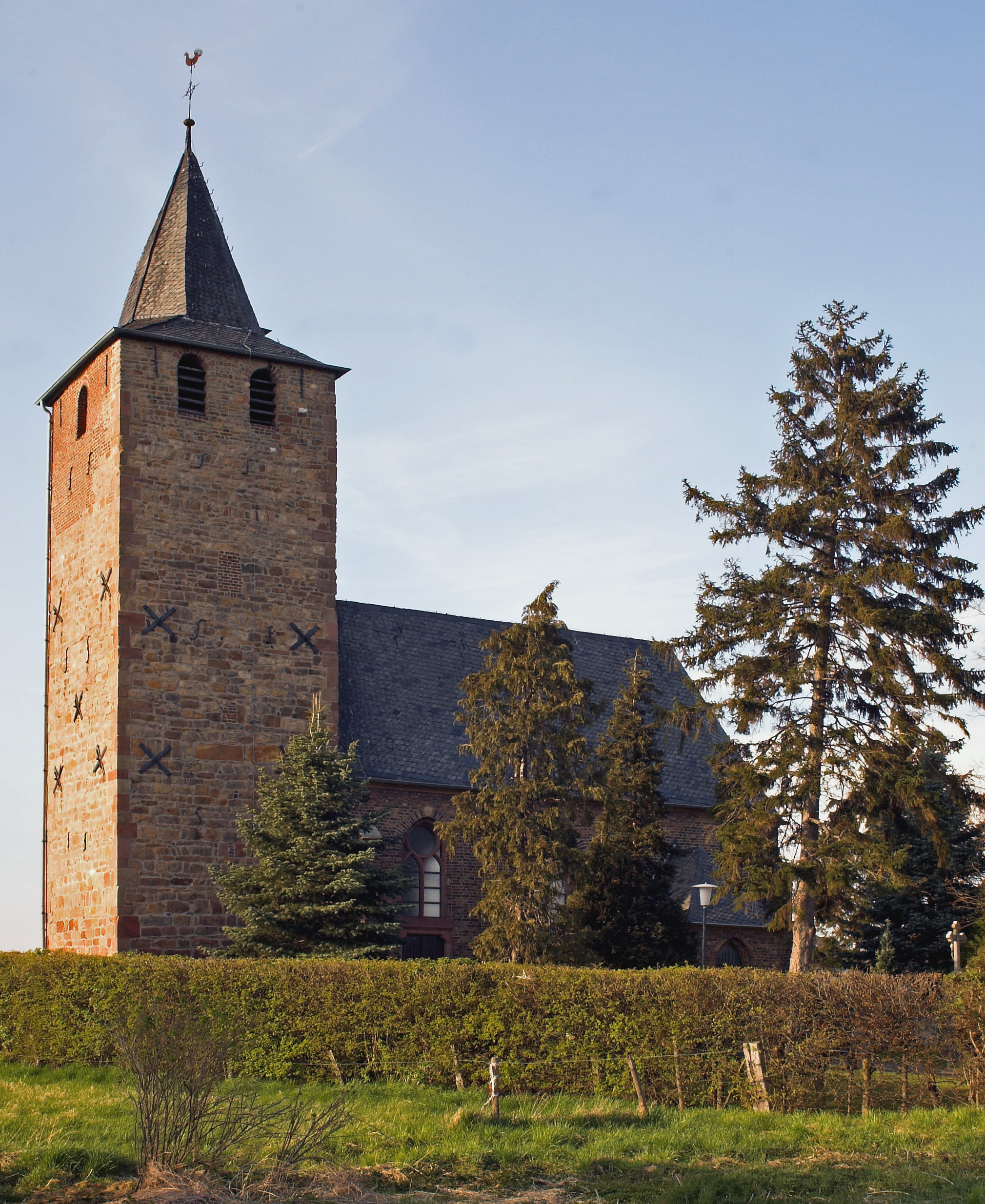 Ühledömche im Dürener Stadtteil Distelrath